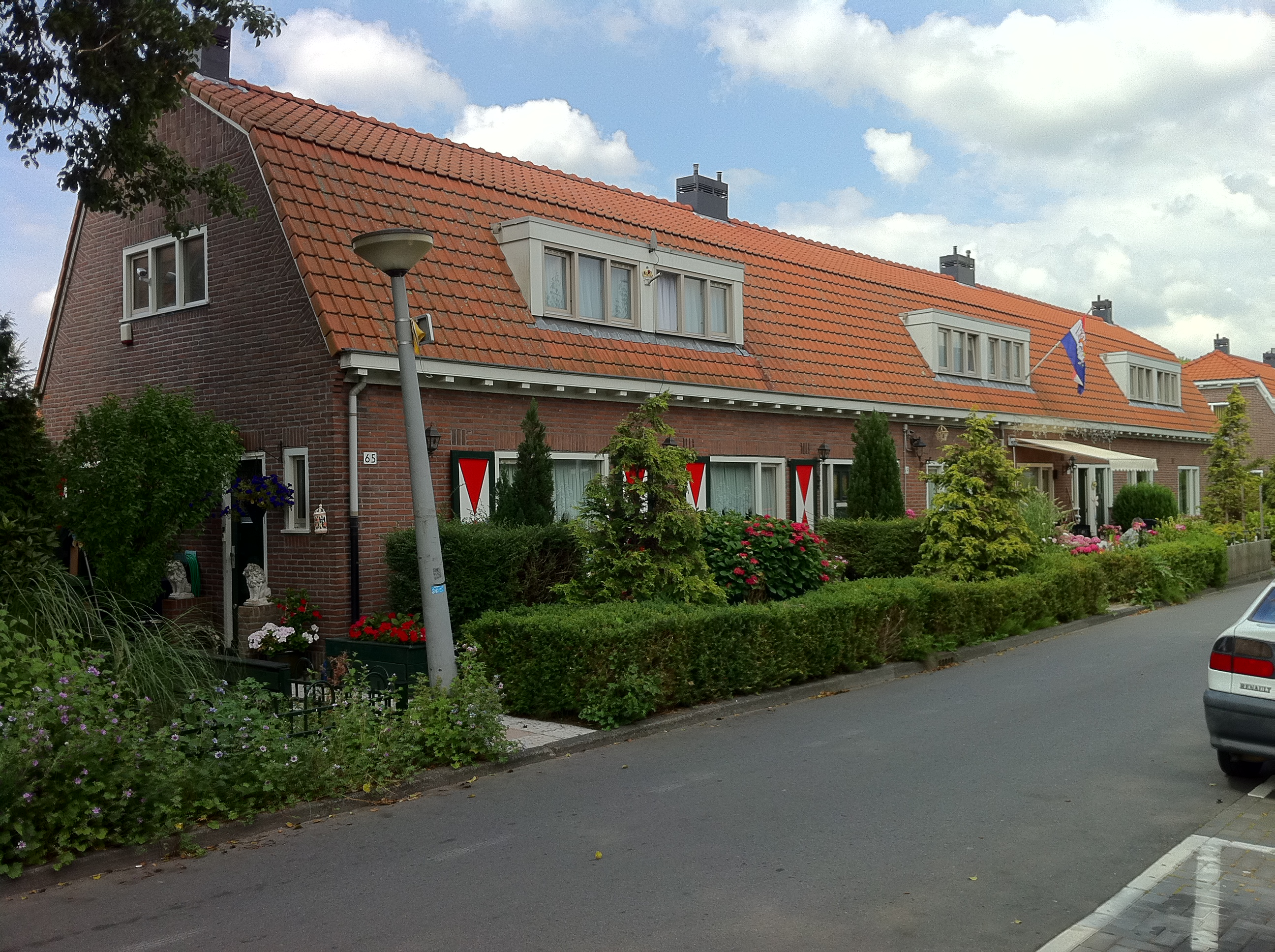 Tuindorp Oostzaan Amsterdam-Noord juli 2011